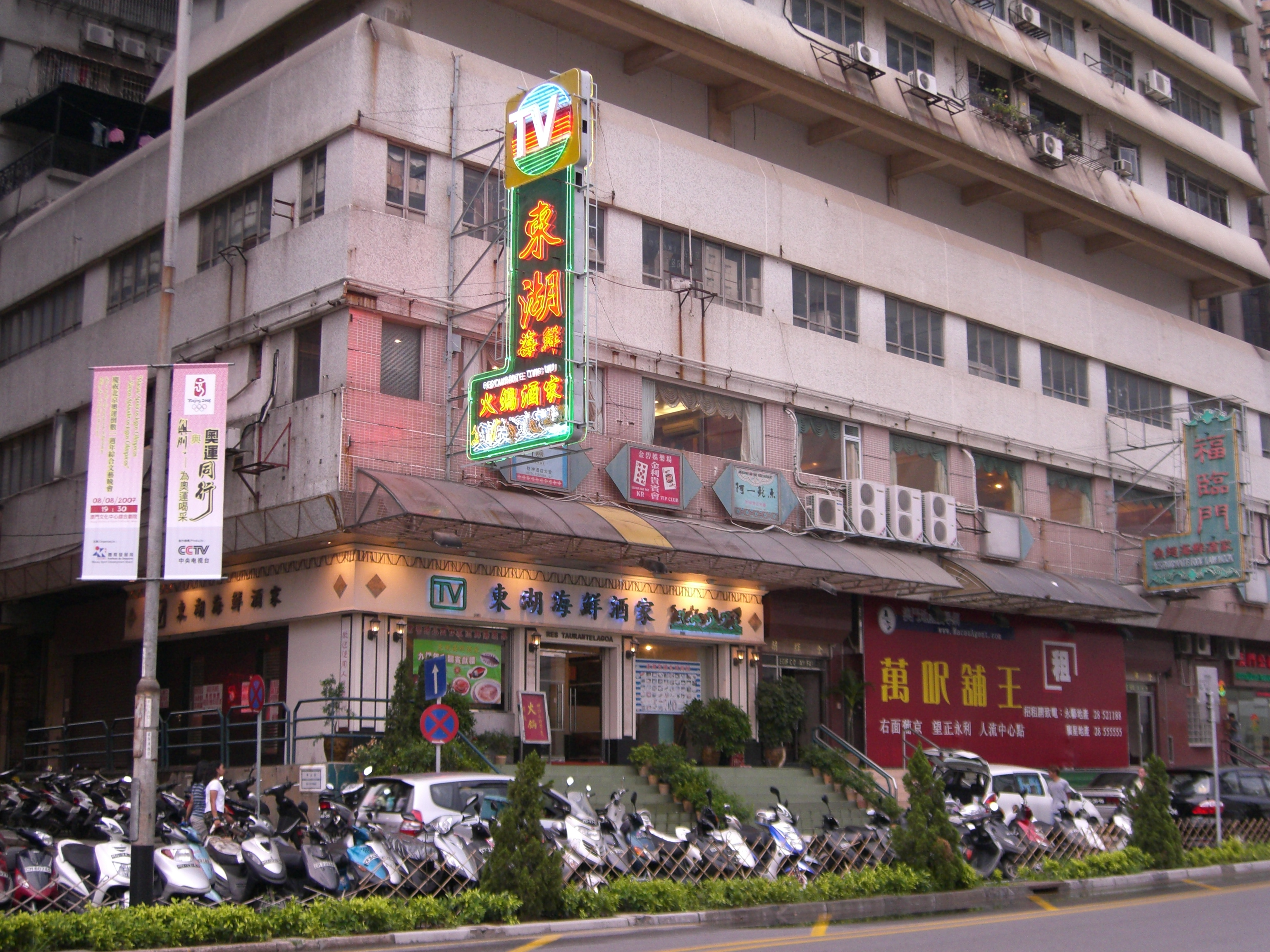 Macau Tong Vu Restaurant